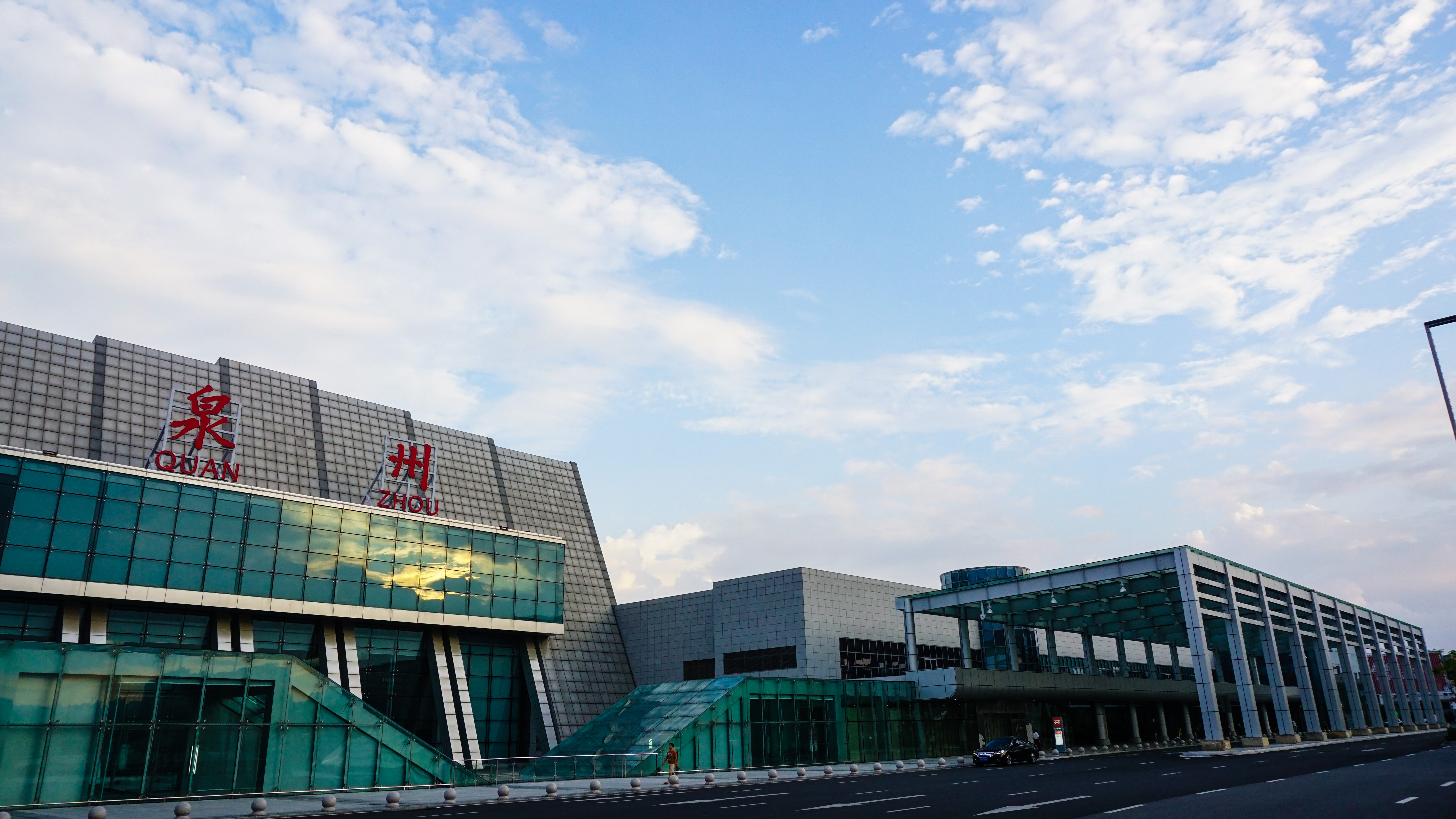 泉州晋江国际机场，国内出发/到达区